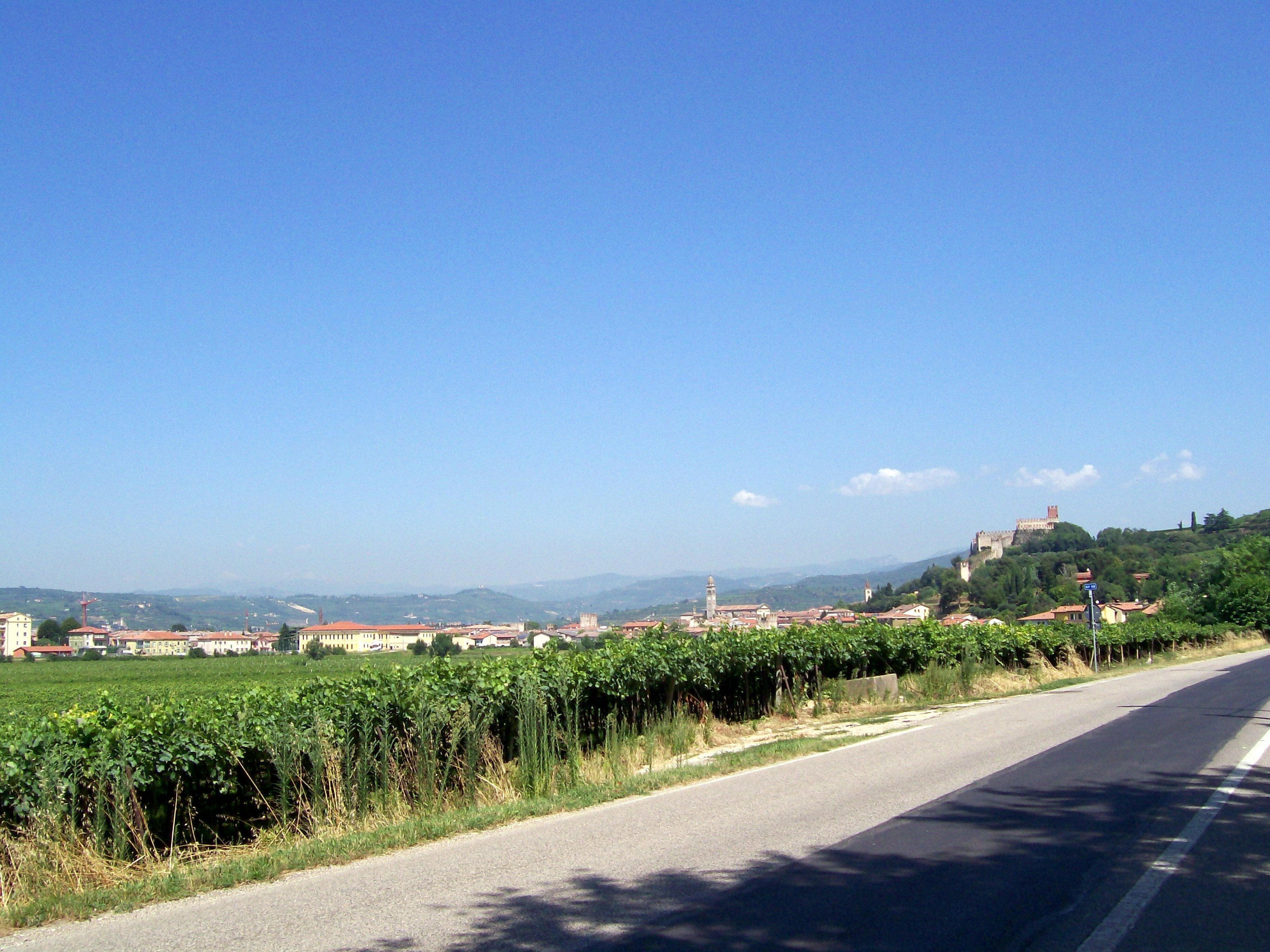 Veduta di Soave dalla strada provinciale 39 (Via S. Lorenzo).